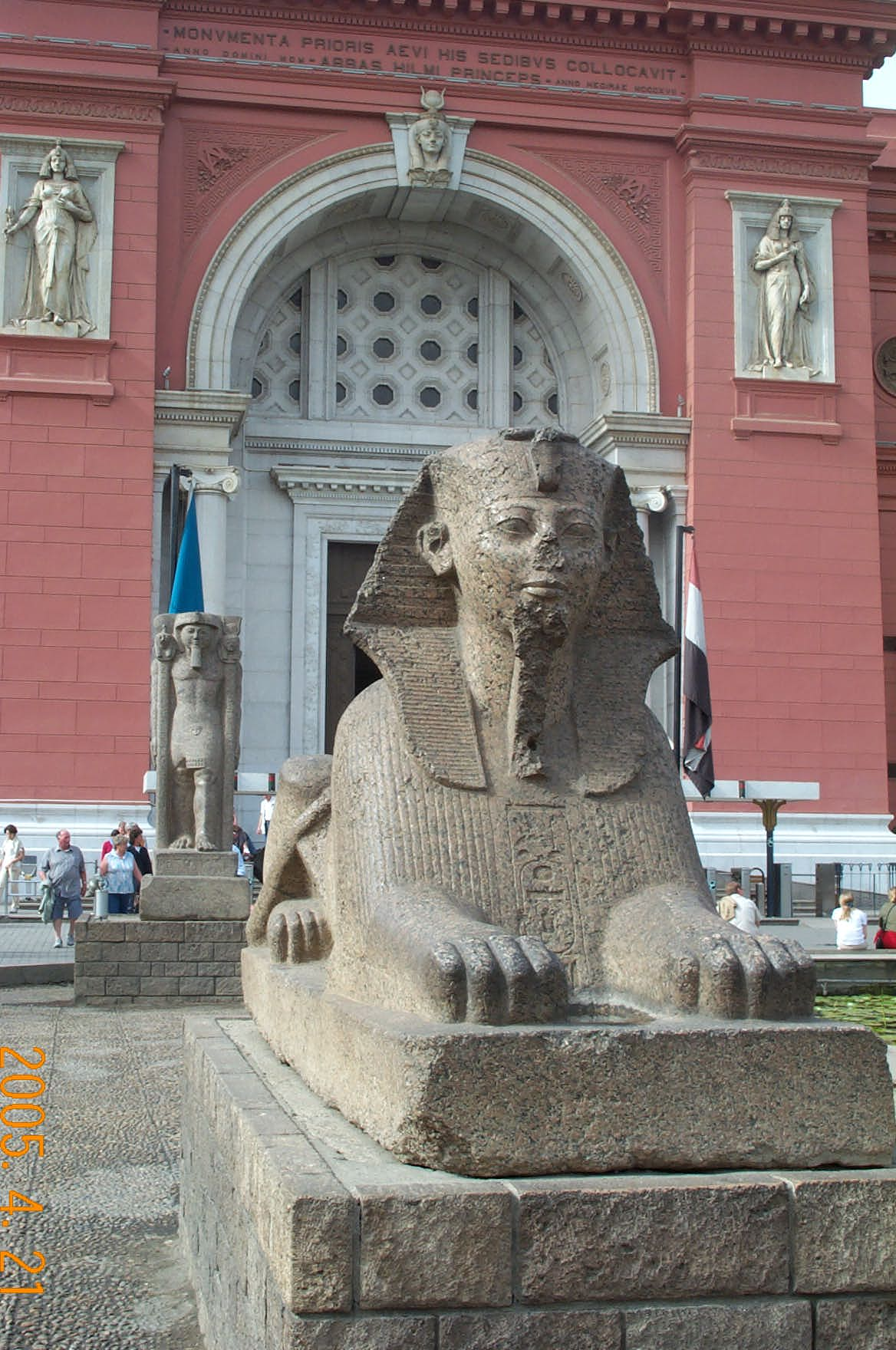 III. Thotmesz szfinxe az Egyiptomi Múzeum kertjében (Egyiptom, Kairó, Tahrír tér, Múzeum kert)